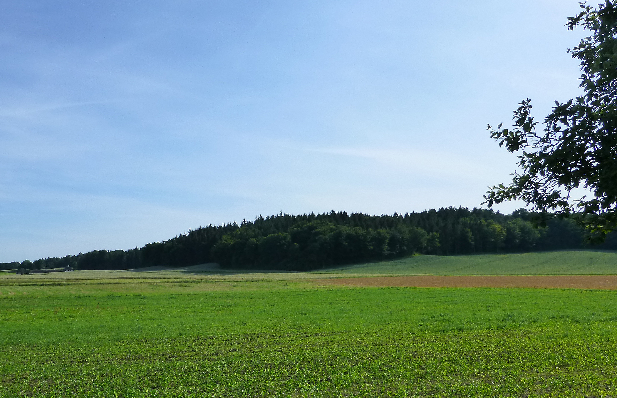 Uldrup Bakker set fra Åkær Ådal